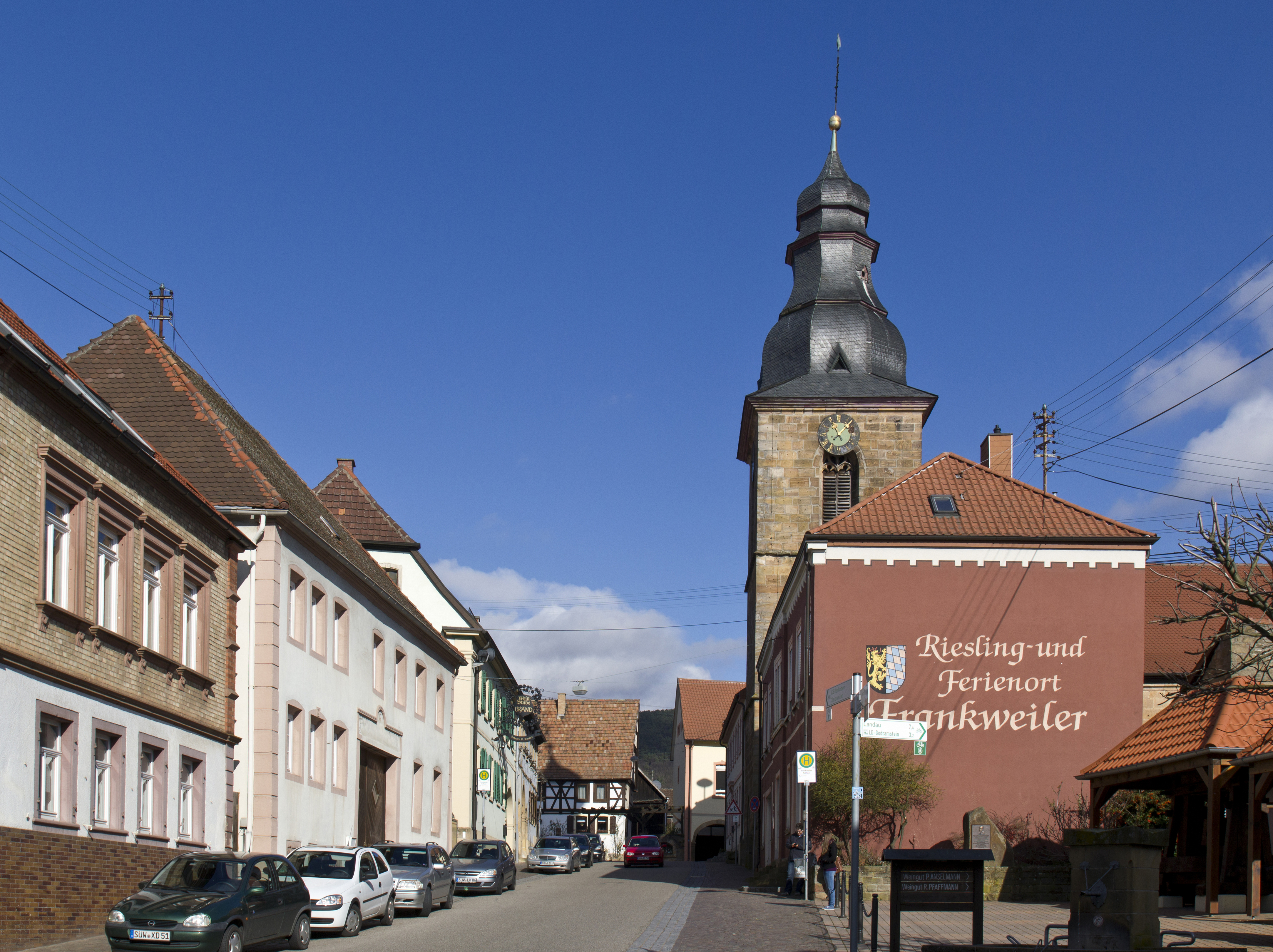 Frankweiler, Blick in die Weinstraße, im Bild auch die protestantische Pfarrkirche